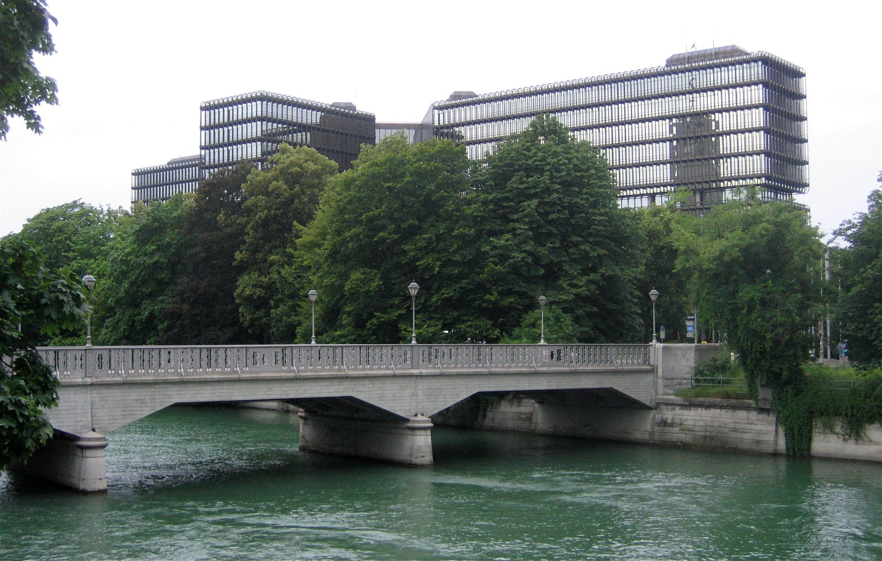 Boschbrücke, im Hintergrund das Europäische Patentamt, München